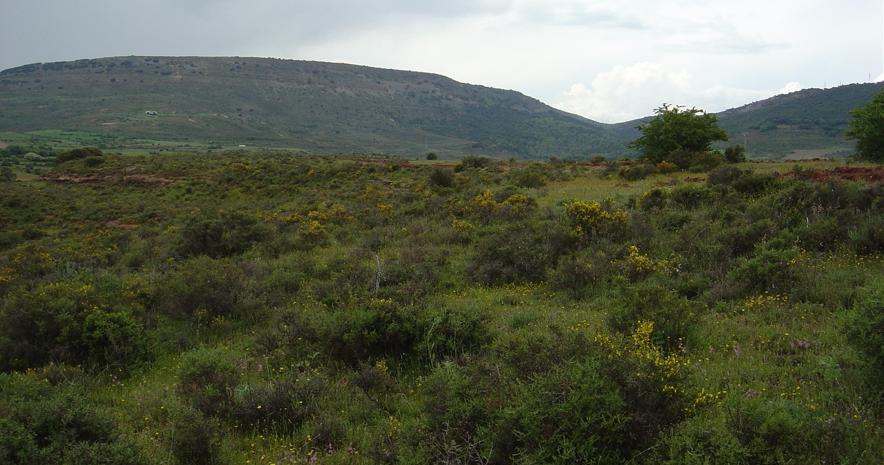 La Muela de Somolinos desde Ujados.